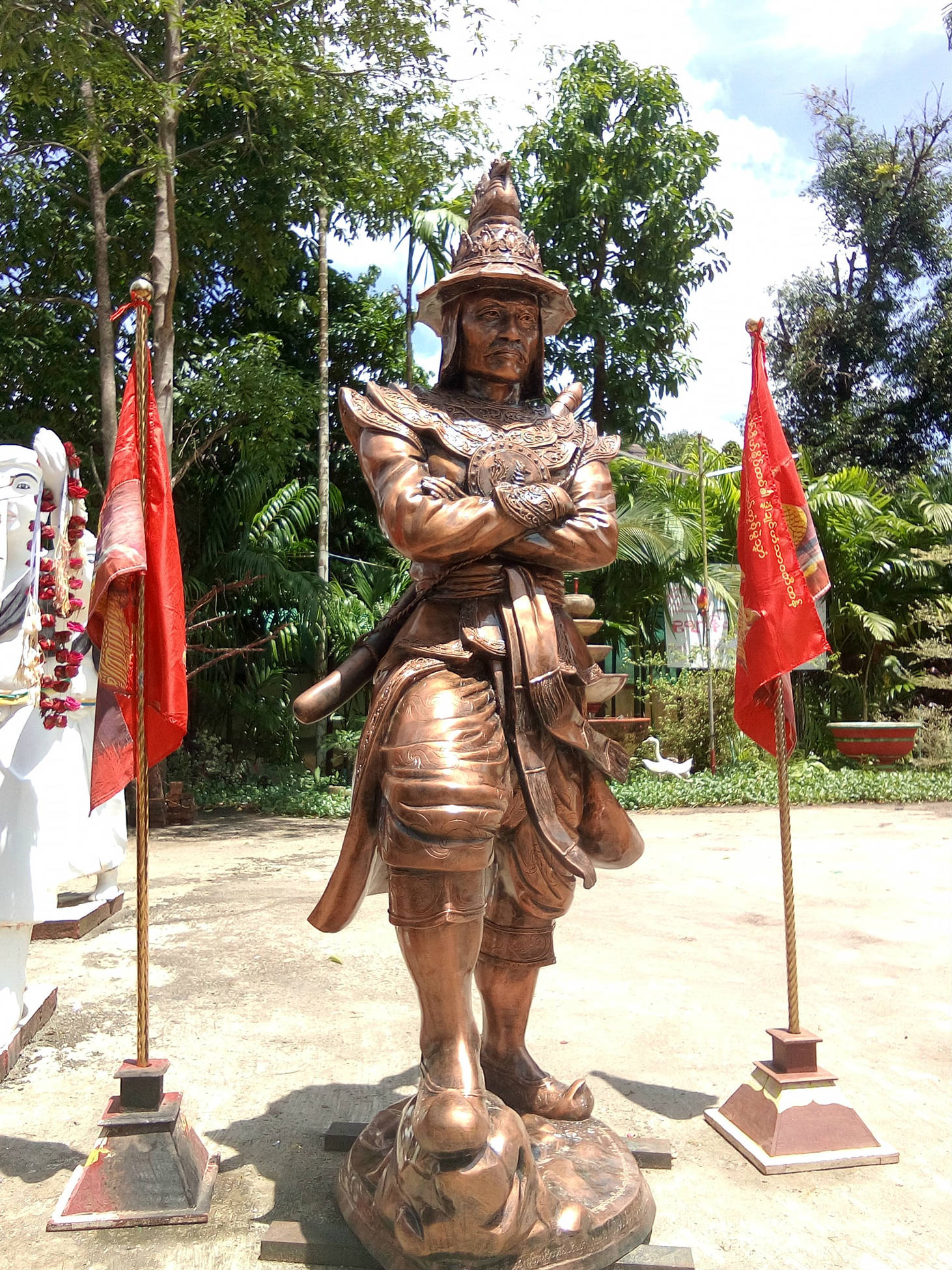 ဘာသာ မန်: ဗီုရုပ်တၠညးရာဇာဓိရာဇ် သွက်ဂွံစွံ ပ္ဍဲကၠအ်ပ္ကဴ ကျာ်ဇြာ